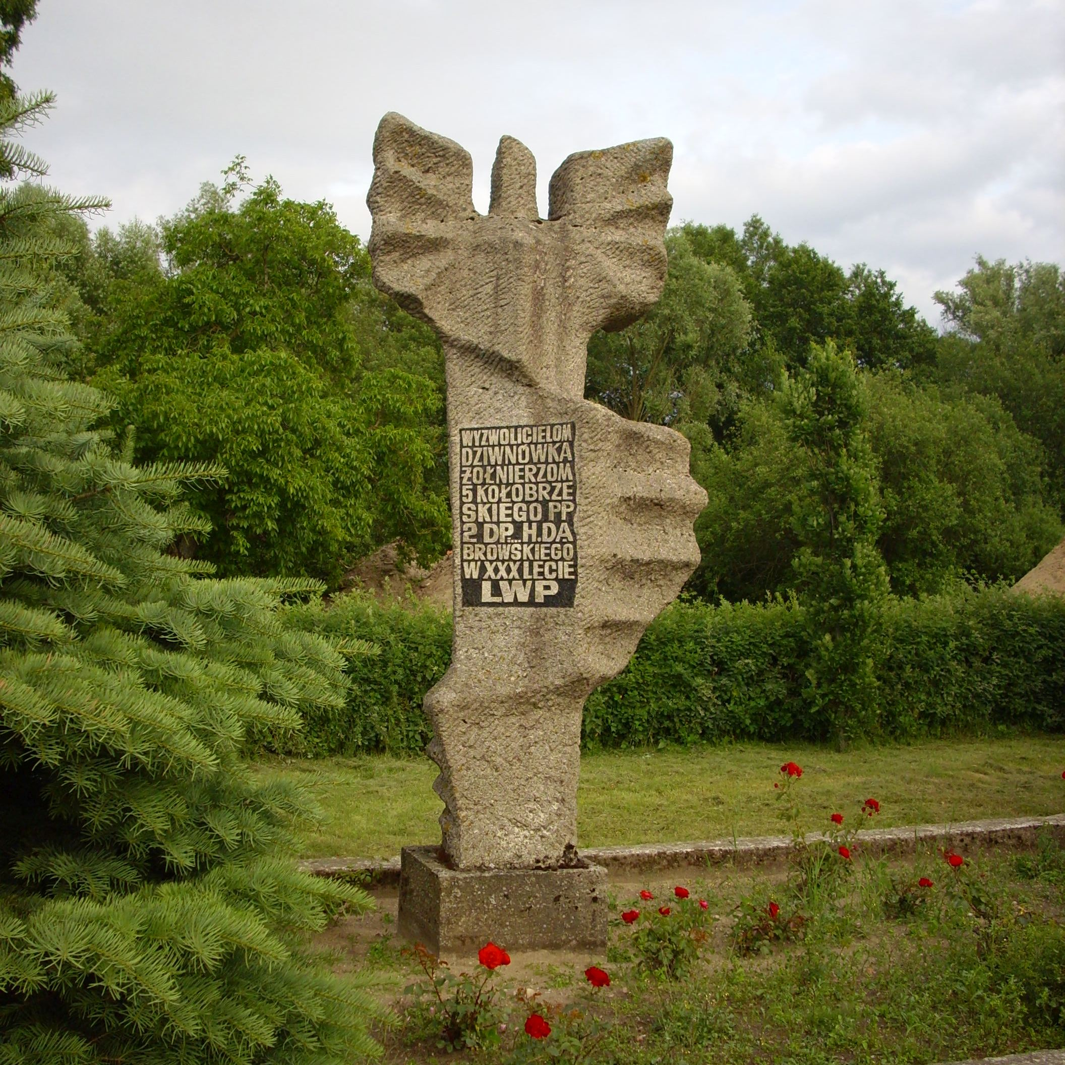 Pomnik z inskrypcją: Wyzwolicielom Dziwnówka, żołnierzom 5 Kołobrzeskiego PP, 2 DP. H. Dąbrowskiego w XXX-lecie LWP